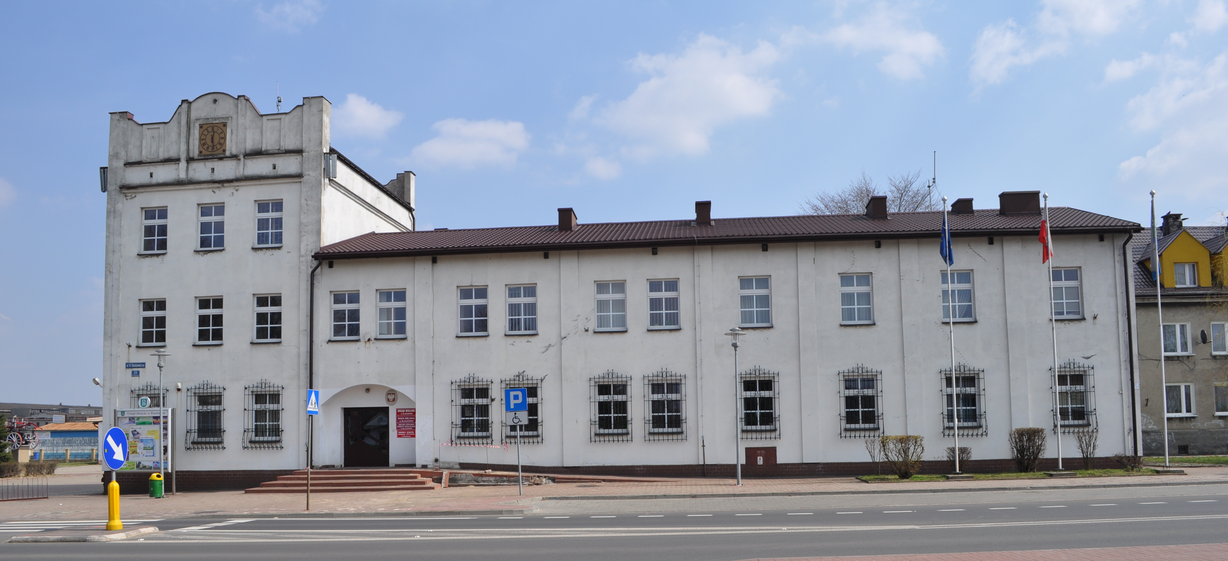 Siedziba Urzędu Miasta w Blachowni